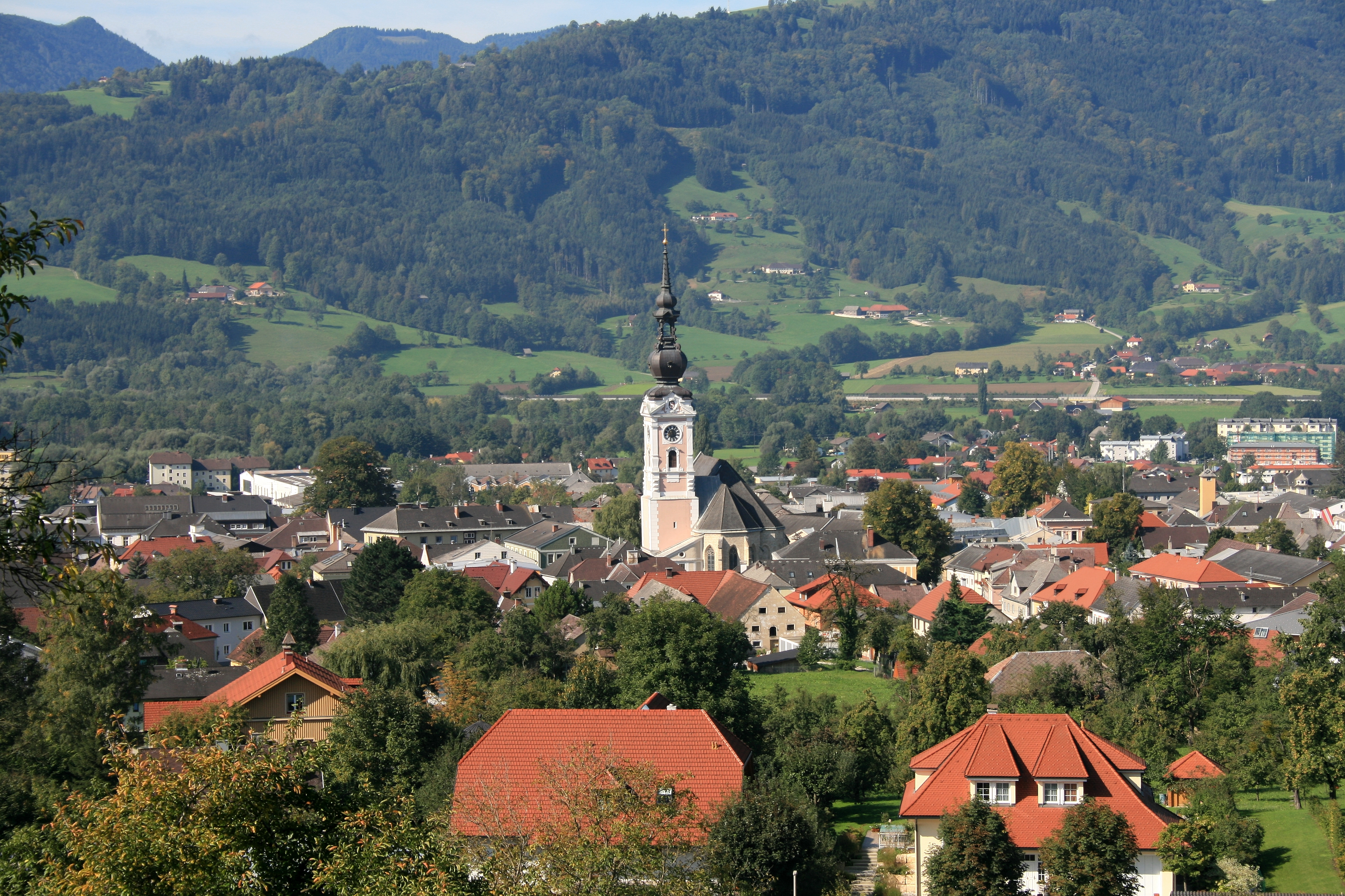 Blick auf die oberösterreichische Bezirkshauptstadt Kirchdorf an der Krems